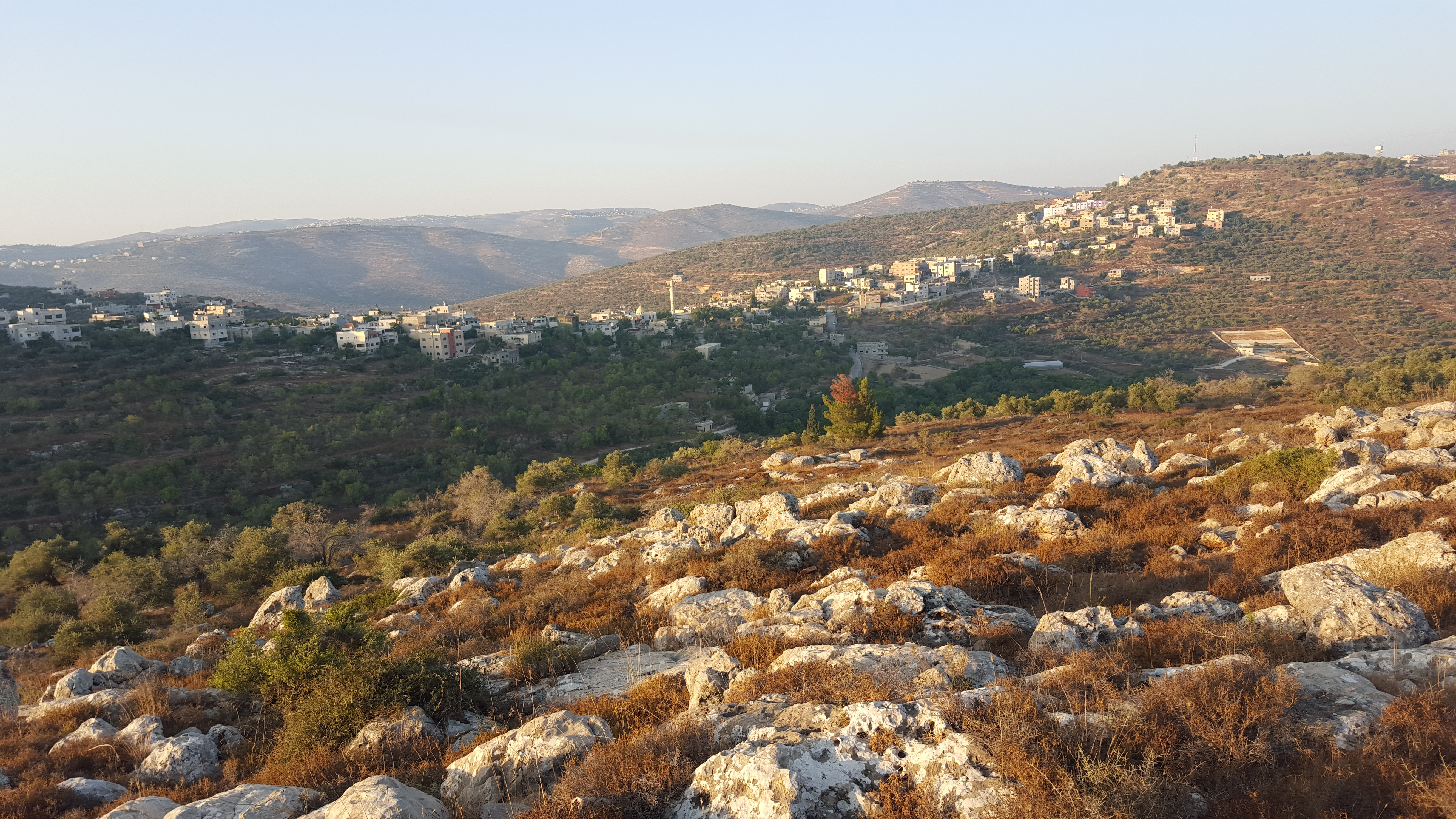 מבט מתפוח מערב